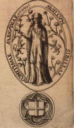 Sybille of Bâgé